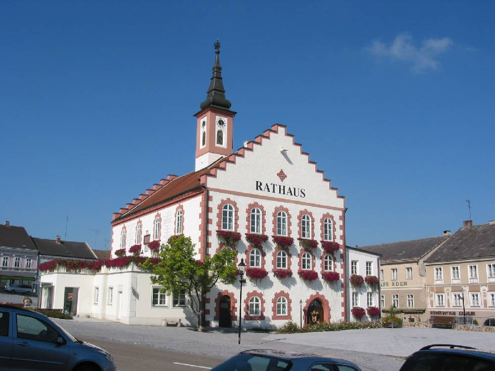 Rathaus Waidhofen an der Thaya